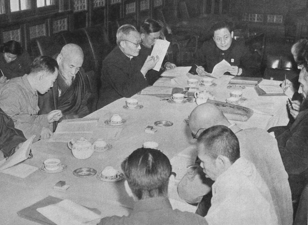 Ausschußsitzung während der Generalversammlung der chinesischen buddhistischen Vereinigung in Peking. Sherab Gyatso (sitzend 2. v.l. 喜饶嘉措), Zhào Pǔchū (趙朴初), der Generalsekretär, am Kopfende.